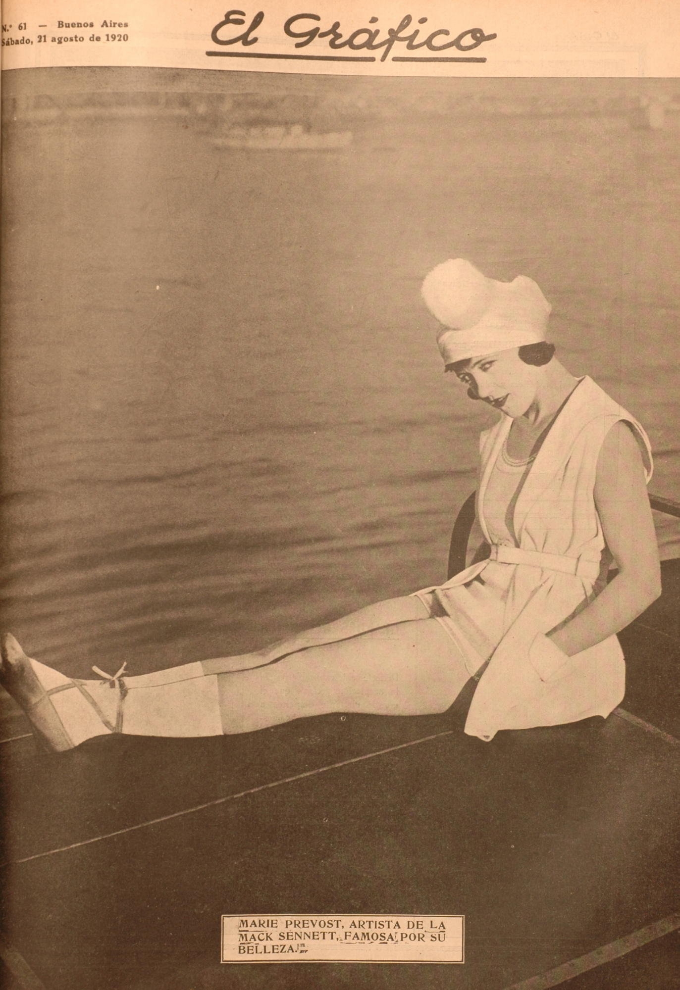 El Grafico del 21 de Agosto de 1920. Edicion 61